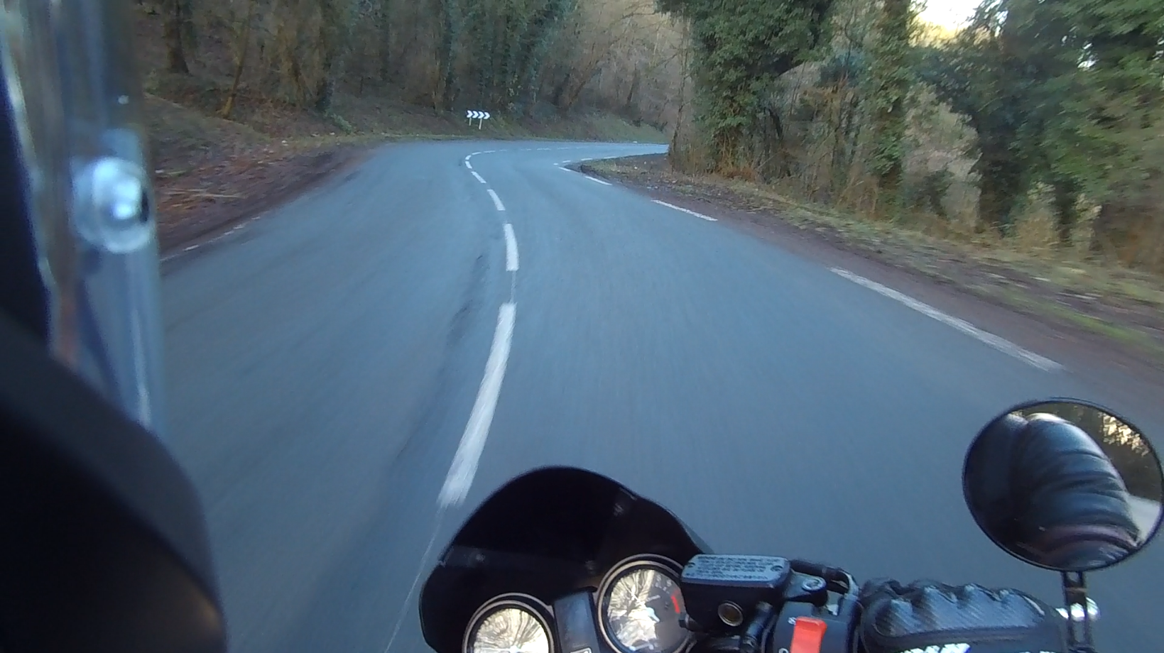 Extrait d'une vidéo filmée dans le cadre d'un motovlog à la campagne